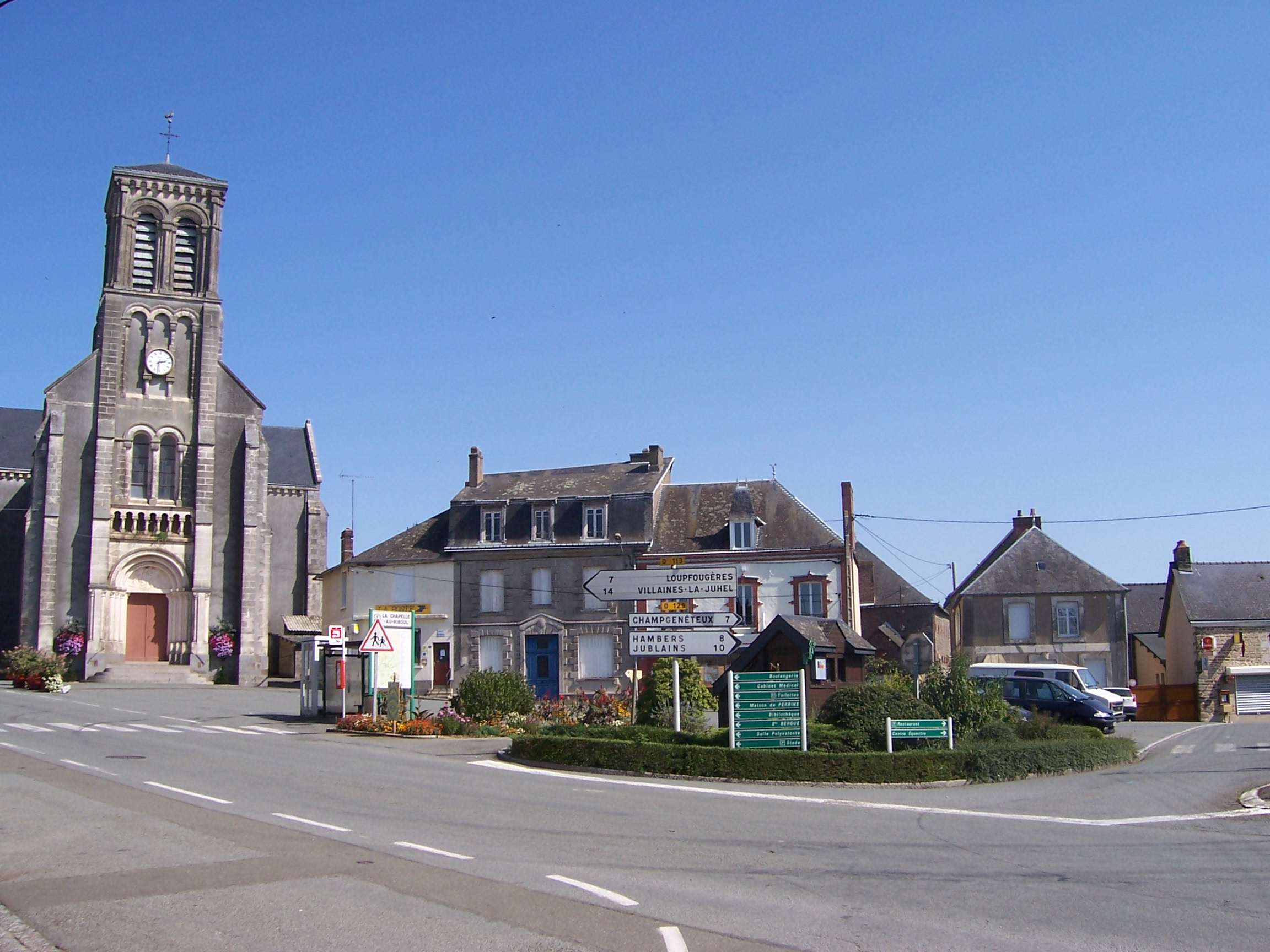 Place de l'église - La chapelle au Riboul